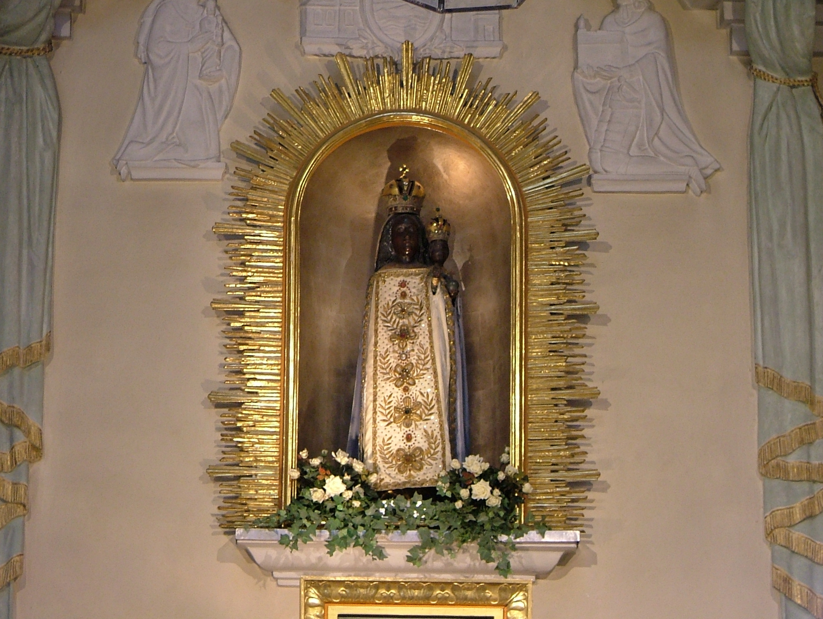 Loretokapelle